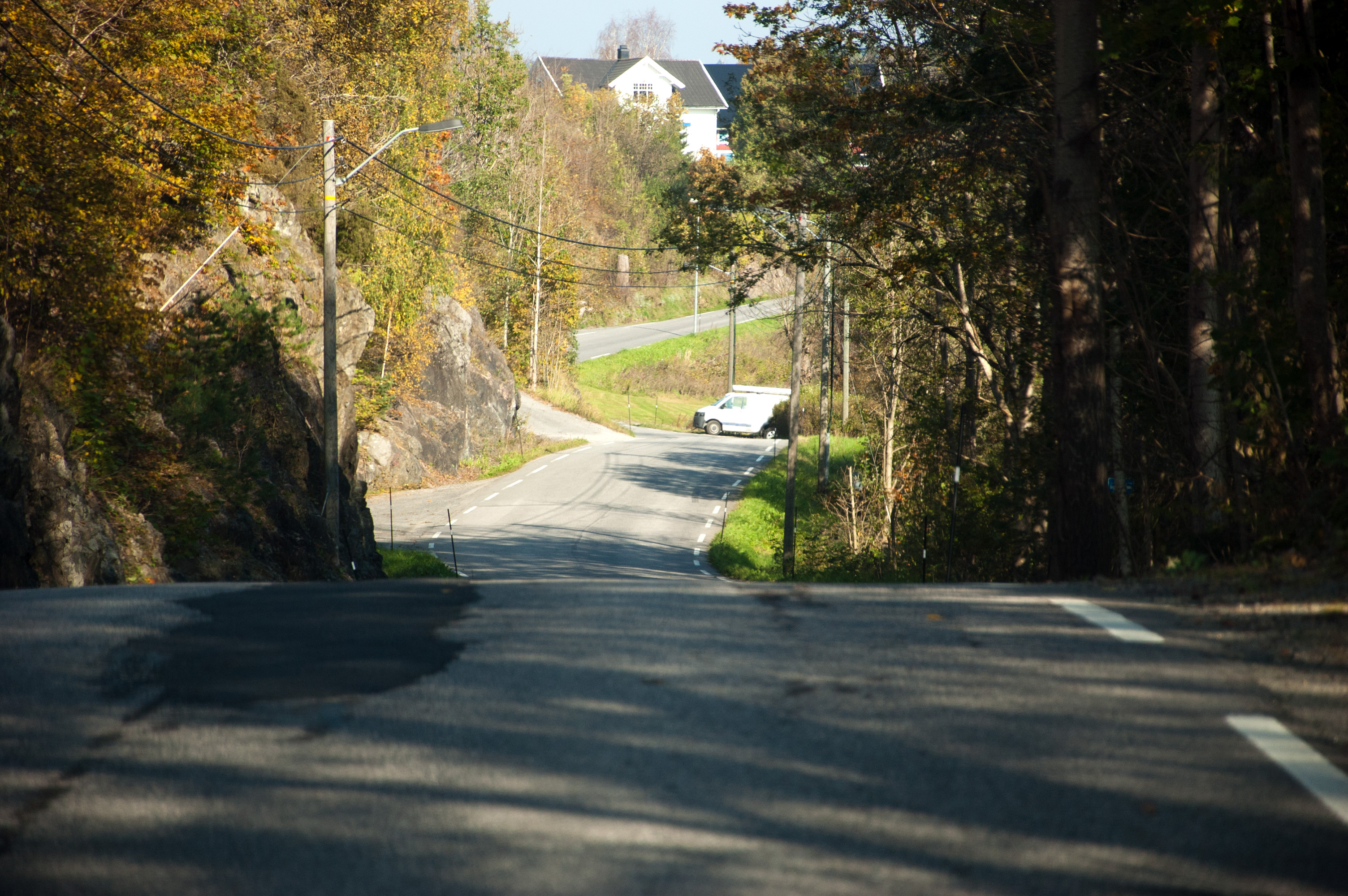 Fylkesvei 1, Bjørkedalsvegen i Porsgrunn, Telemark